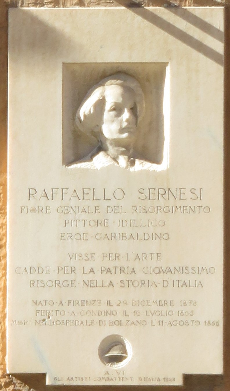 Lapide in via Leonardo da Vinci 9. Bolzano